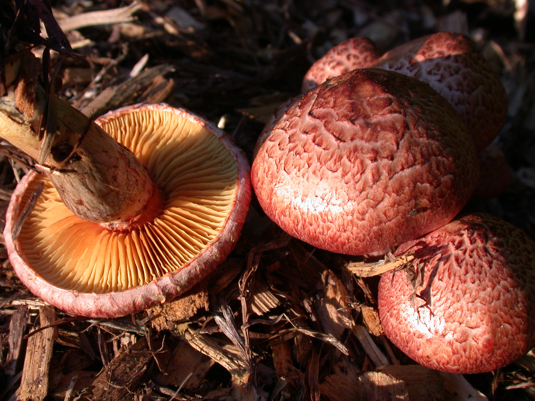 Gymnopilus luteofolius